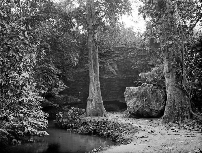 Negatief. Grot te Rengel, Oost-Java